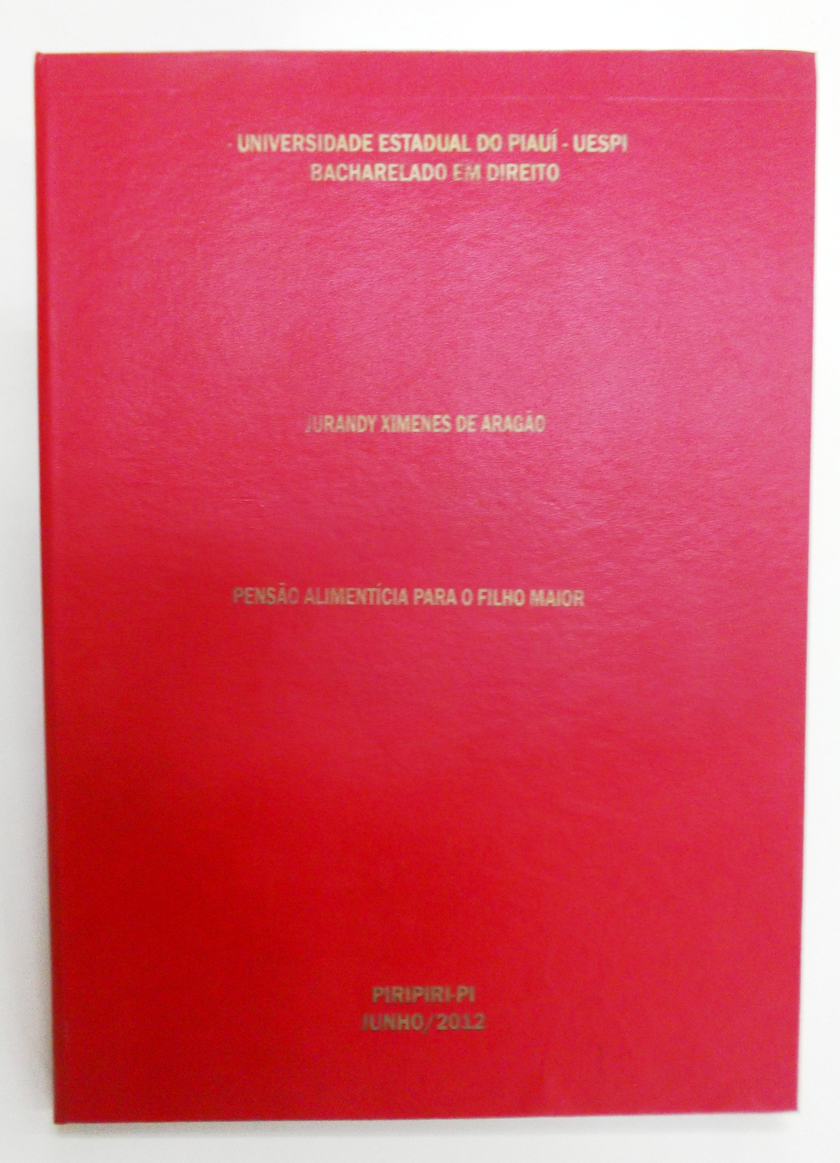 Monografia de Bacharelado em Direito na Universidade Estadual do Piauí - UESPI.